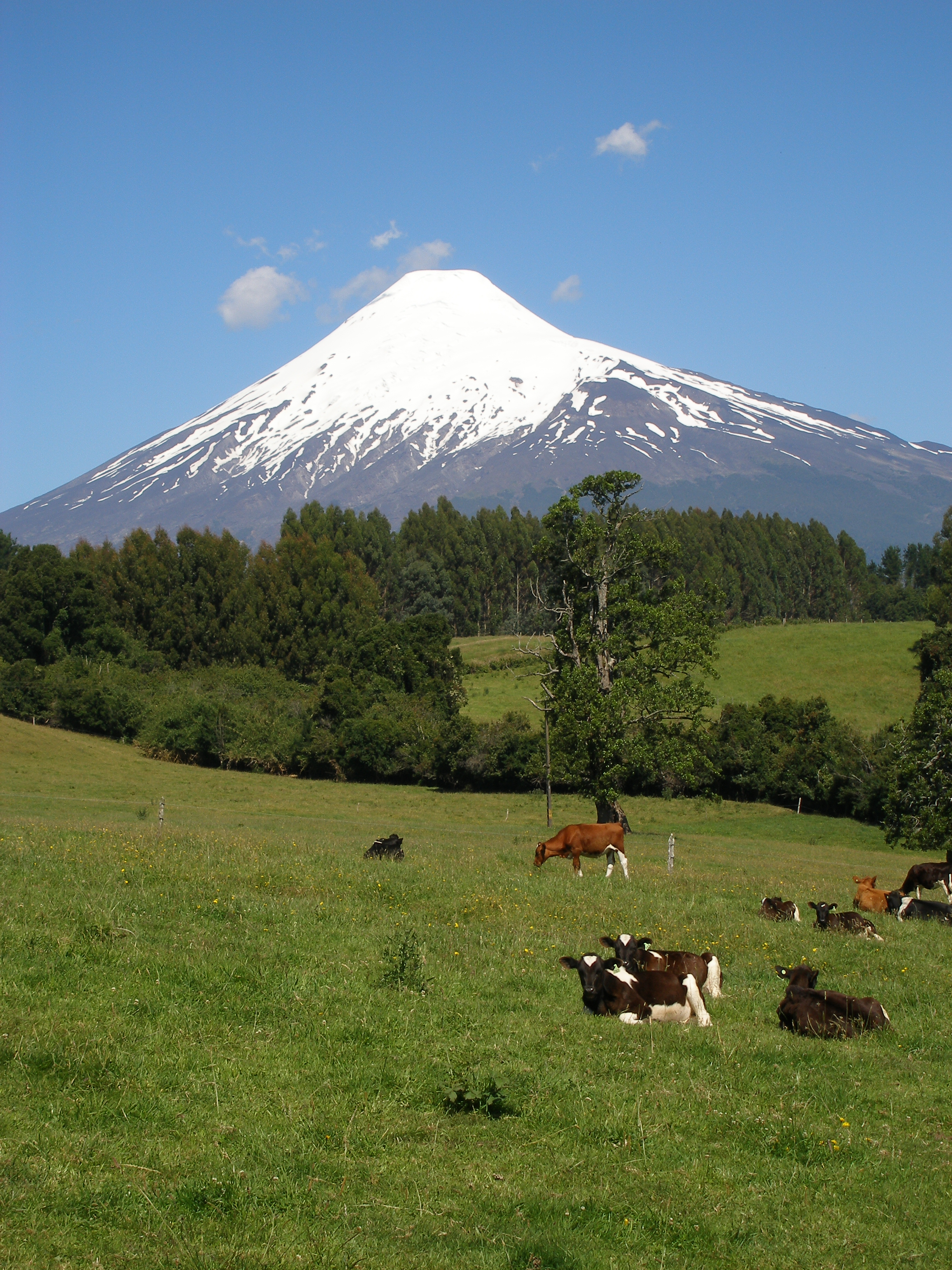 volcan Osorno cerca de Cascadas